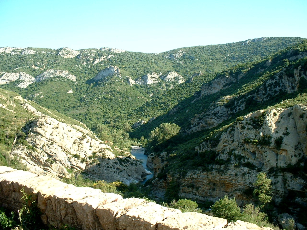 Gorges du Verdouble à Padern